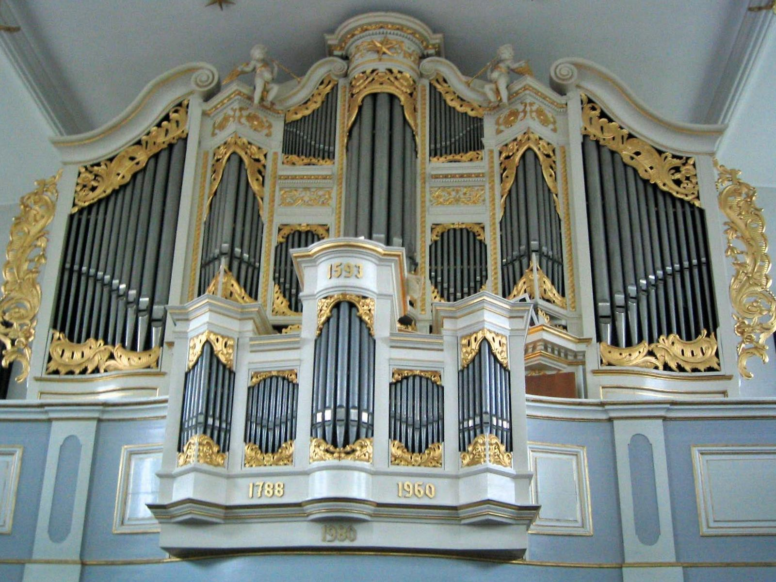 Orgel in Wöhrden, St. Nicolai